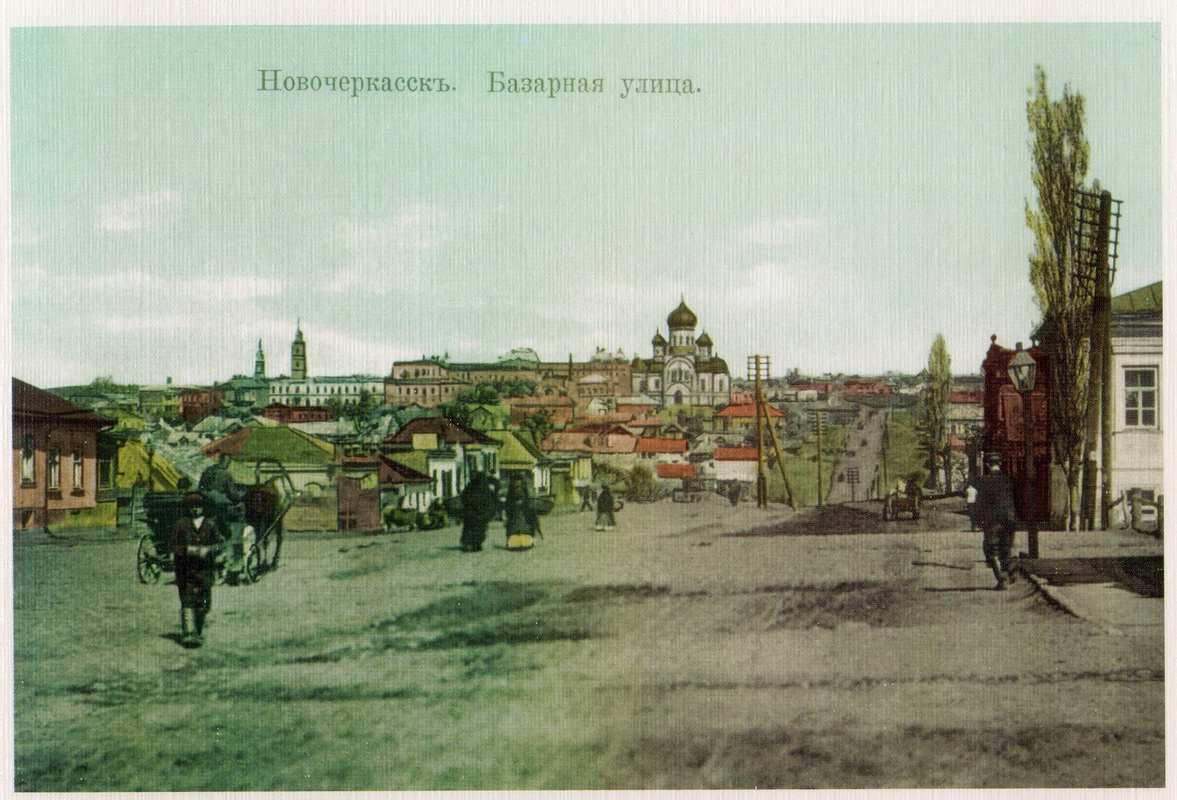 Базарная улица в Новочеркасске на дореволюционной открытке